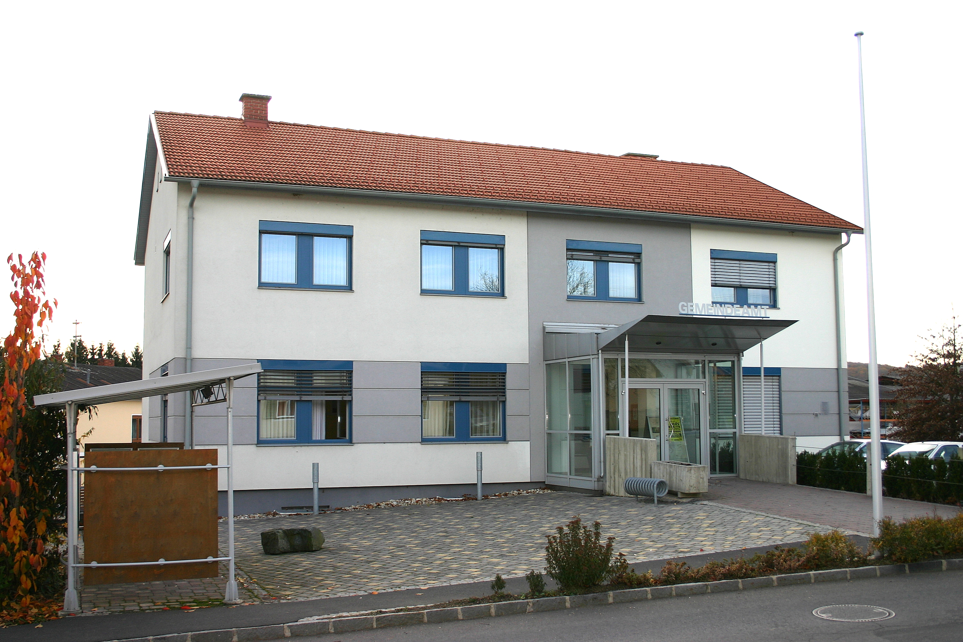 Gerersdorf-Sulz Gemeindeamt